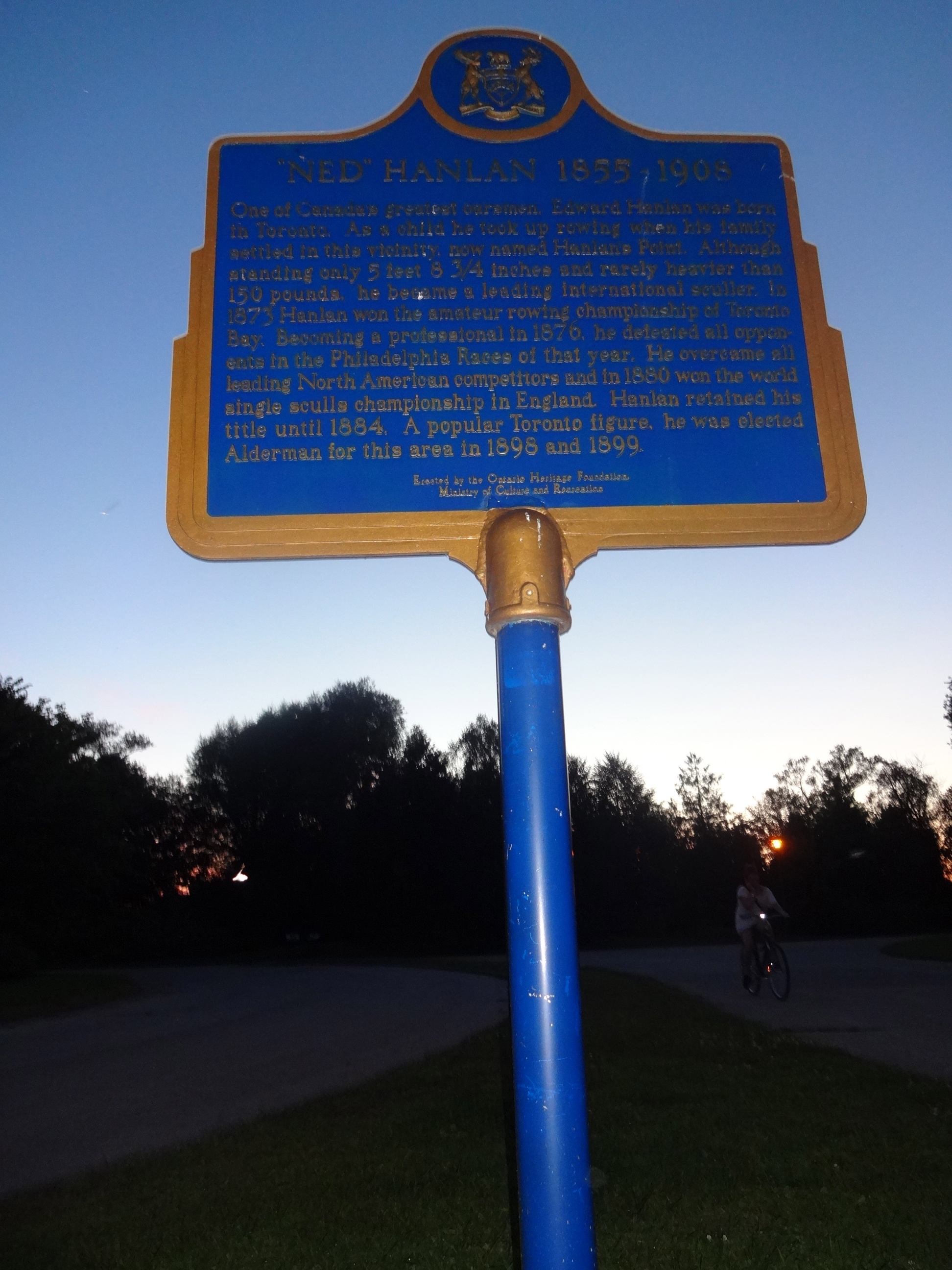 Placa na Toronto Island.